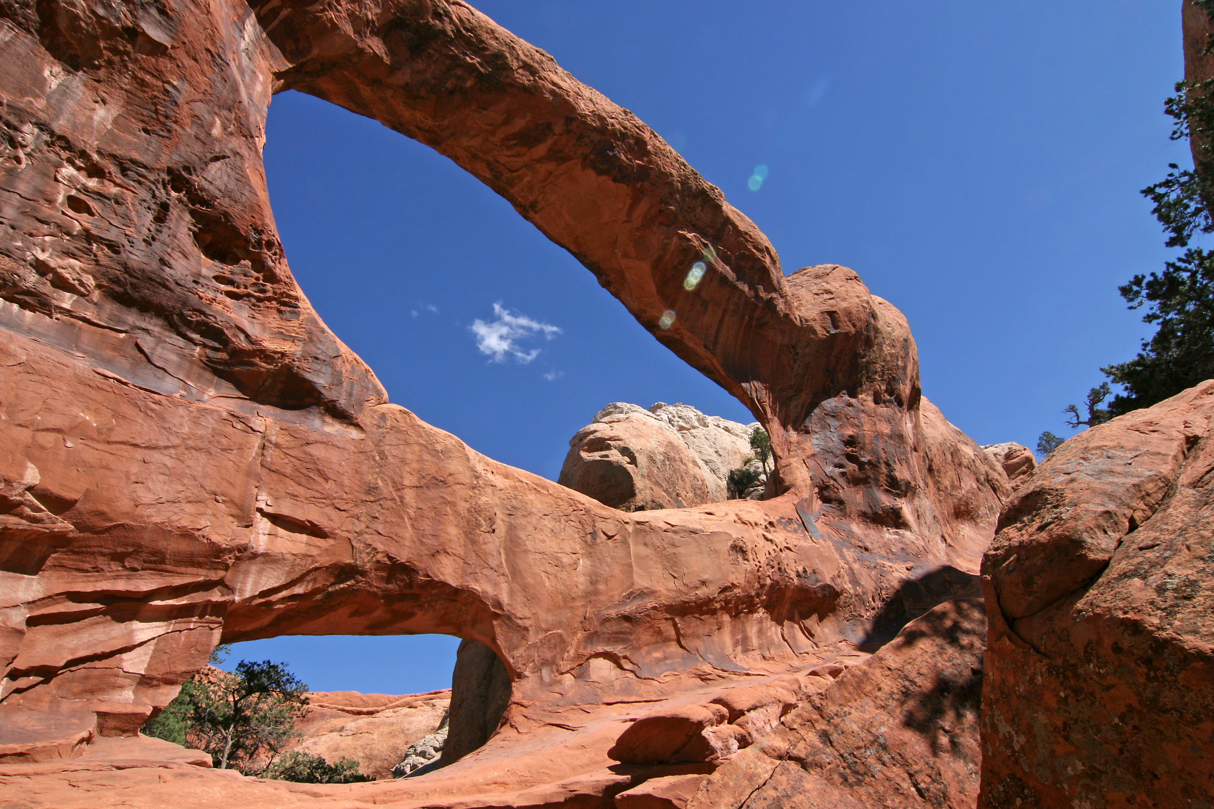 Double-O-Arch im Arches-Nationalpark im Südwesten der USA